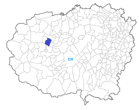 Posizione del comune nella provincia di Cuneo